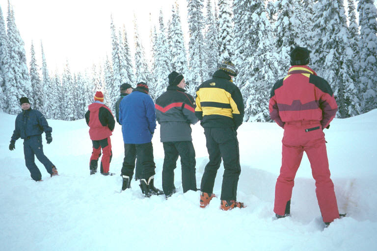 pee